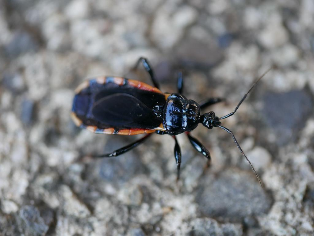 Ectrychotes andreae：ビロウドサシガメ 2018/08/28 和歌山県田辺市：Tanabe City. Wakayama Pref. Japan